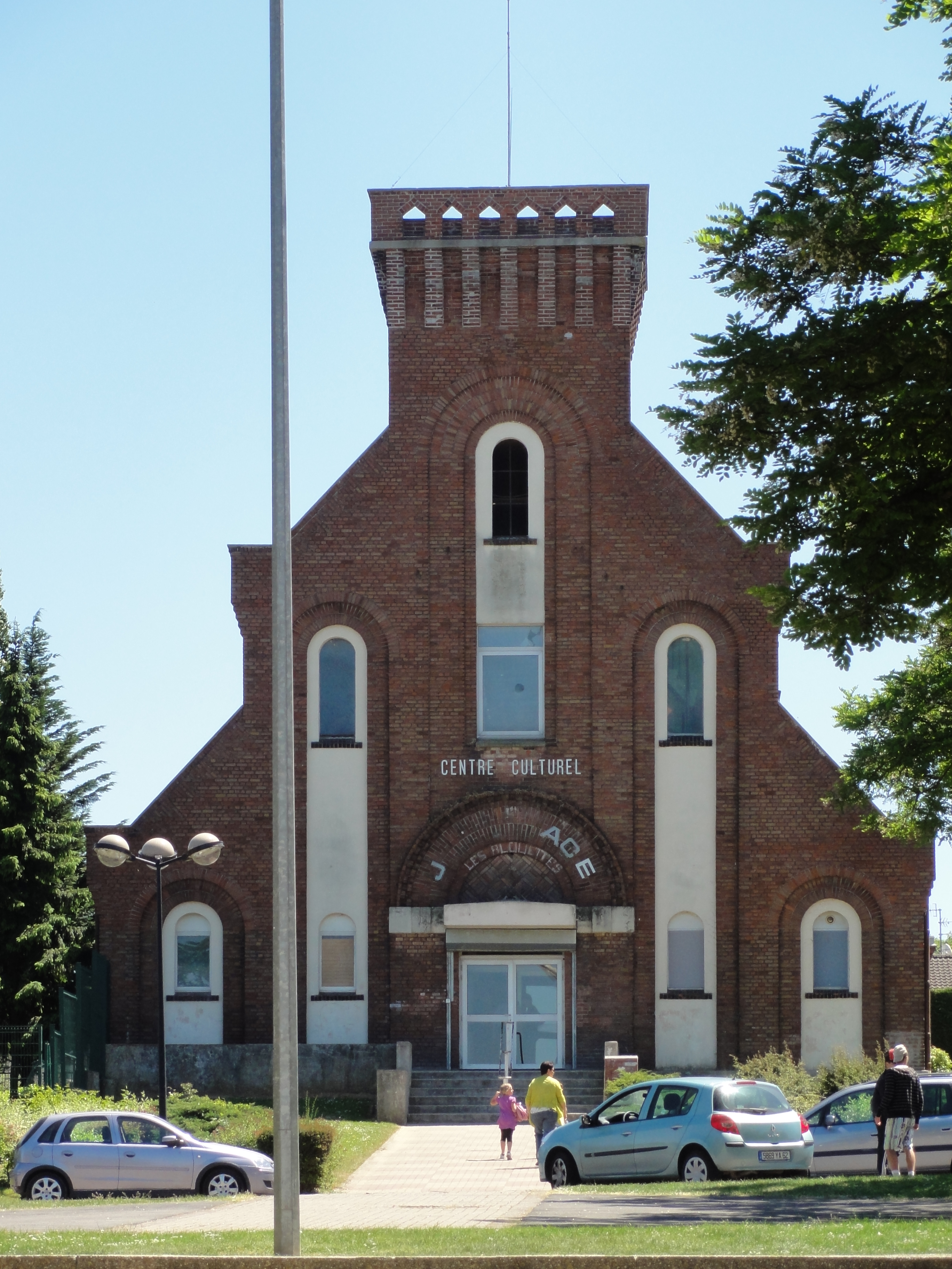 Église des cités de la fosse n° 1 - 1 bis - 1 ter de la Compagnie des mines de Béthune, Bully-les-Mines, Pas-de-Calais, Nord-Pas-de-Calais, France.